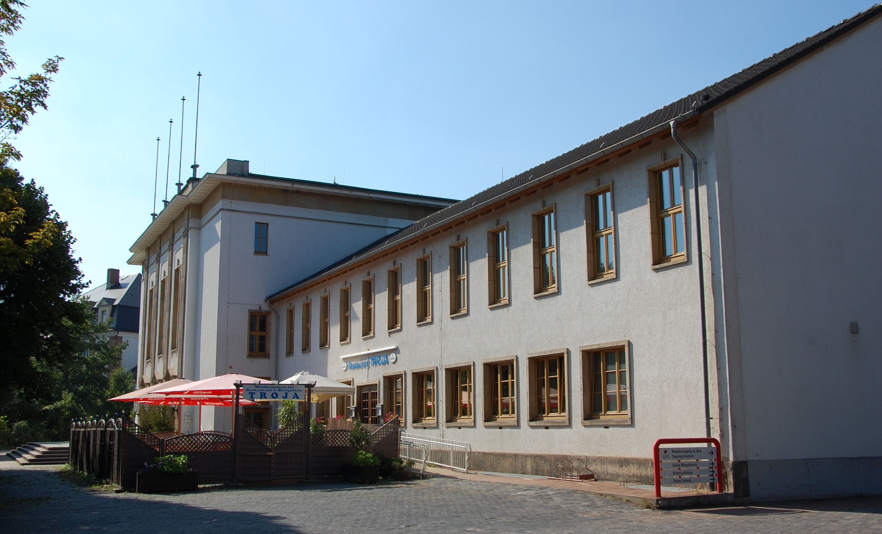 AMO in Magdeburg, Blick von der Ostseite